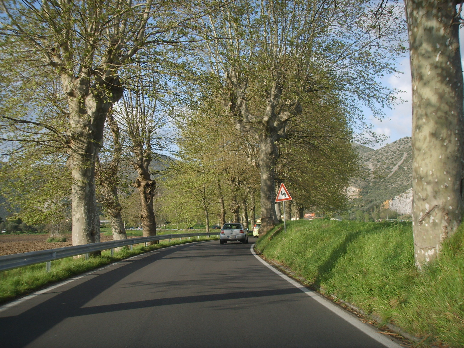 Pisa, via statale abetone per san giuliano terme